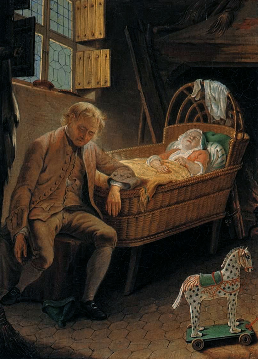 "Мужчина у колыбели". Начало 1770-х. Холст, масло. 43х31,5. Собрание Третьяковской галереи.